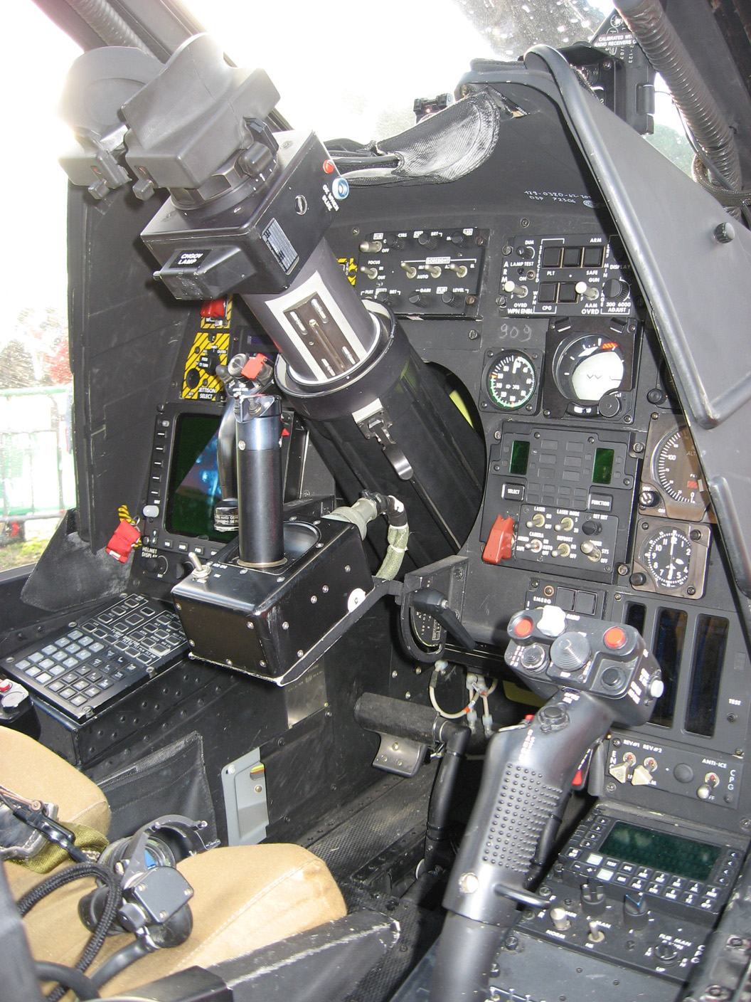 Cabina di pilotaggio dell'Agusta A.129 Mangusta, fotografato in occasione della Festa delle Forze Armate. L'esemplare era in esposizione pubblica al circo Massimo (Roma).